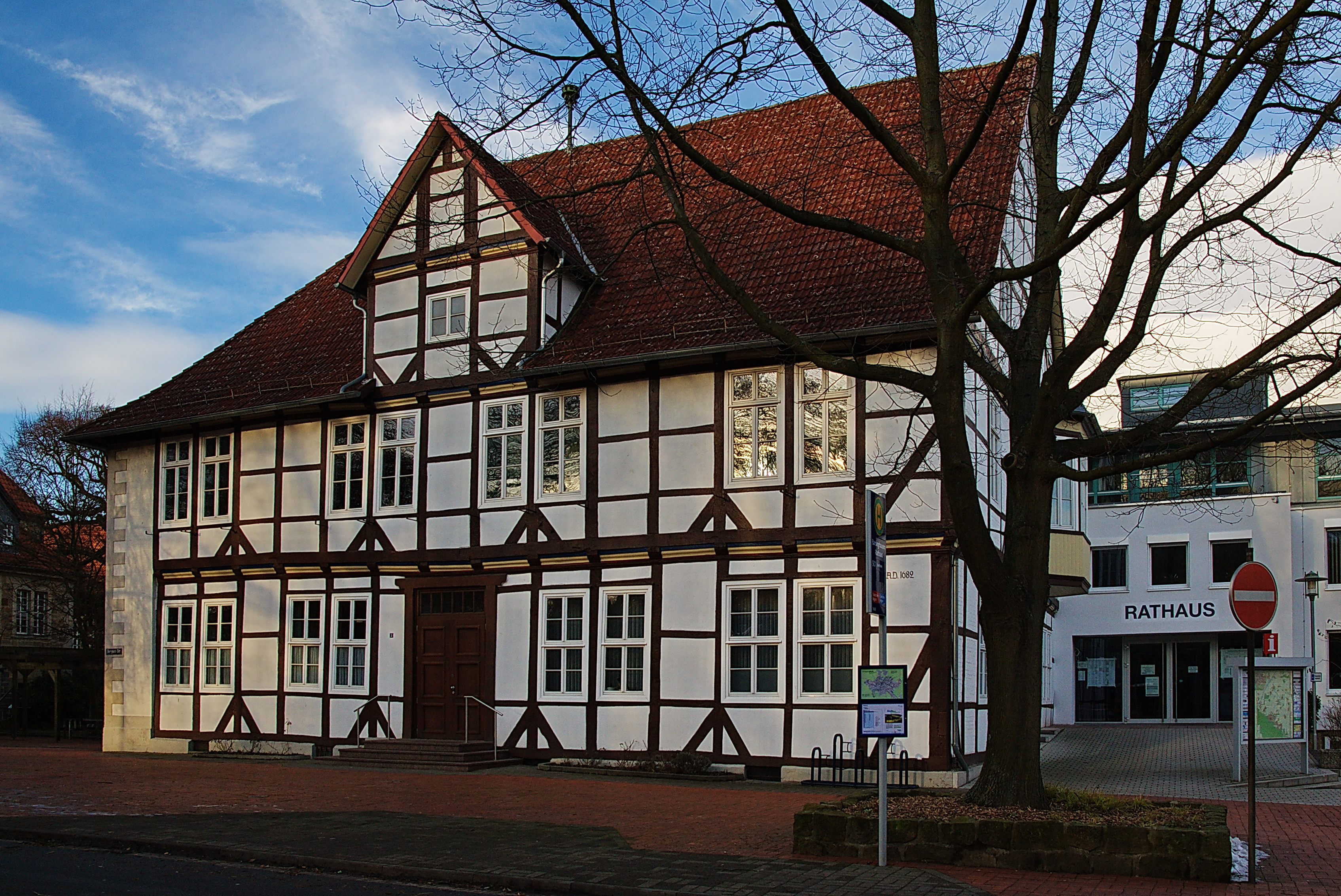 Rathaus Barsinghausen, Niedersachsen, Deutschland